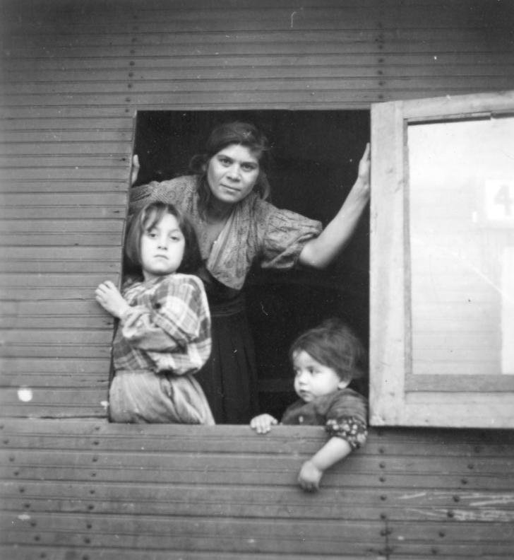 Berlin-Marzahn Elisabeth Weirich, Wagen 4